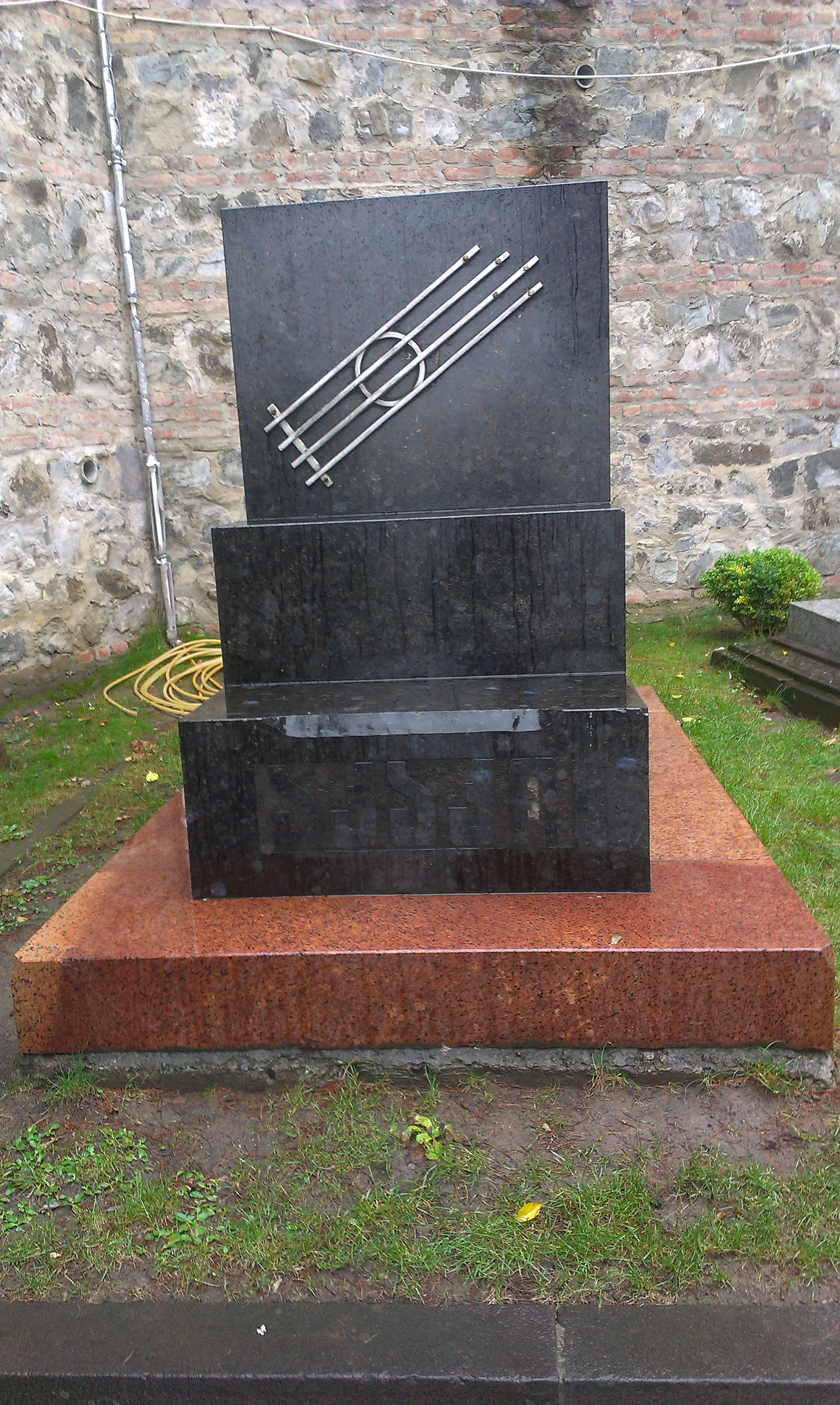 Пантеон Мтацминда